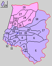 山形県飽海郡の町村。